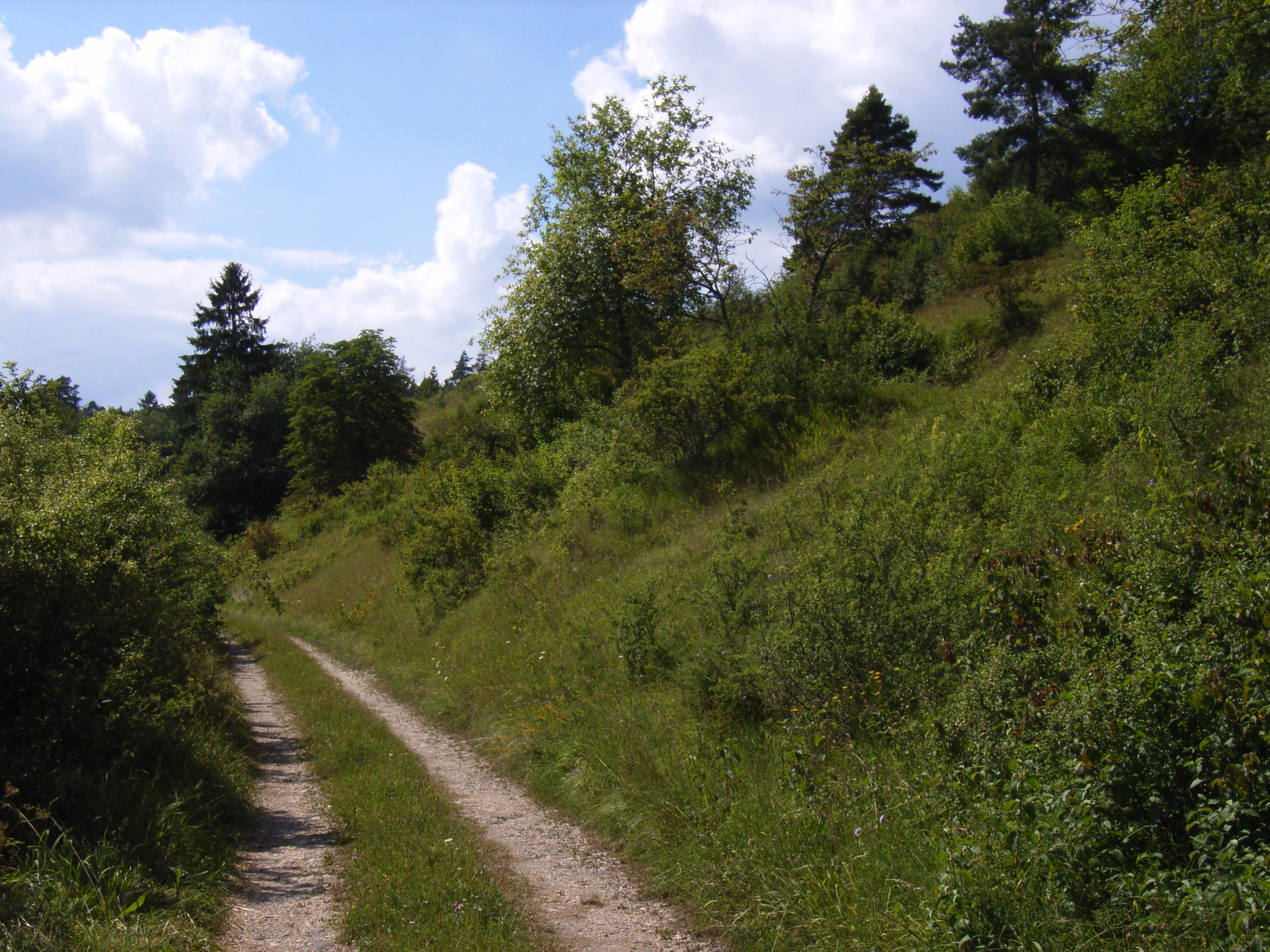 Kalkmagerrasen mit Schlehengebüsch am Südrand des NSG